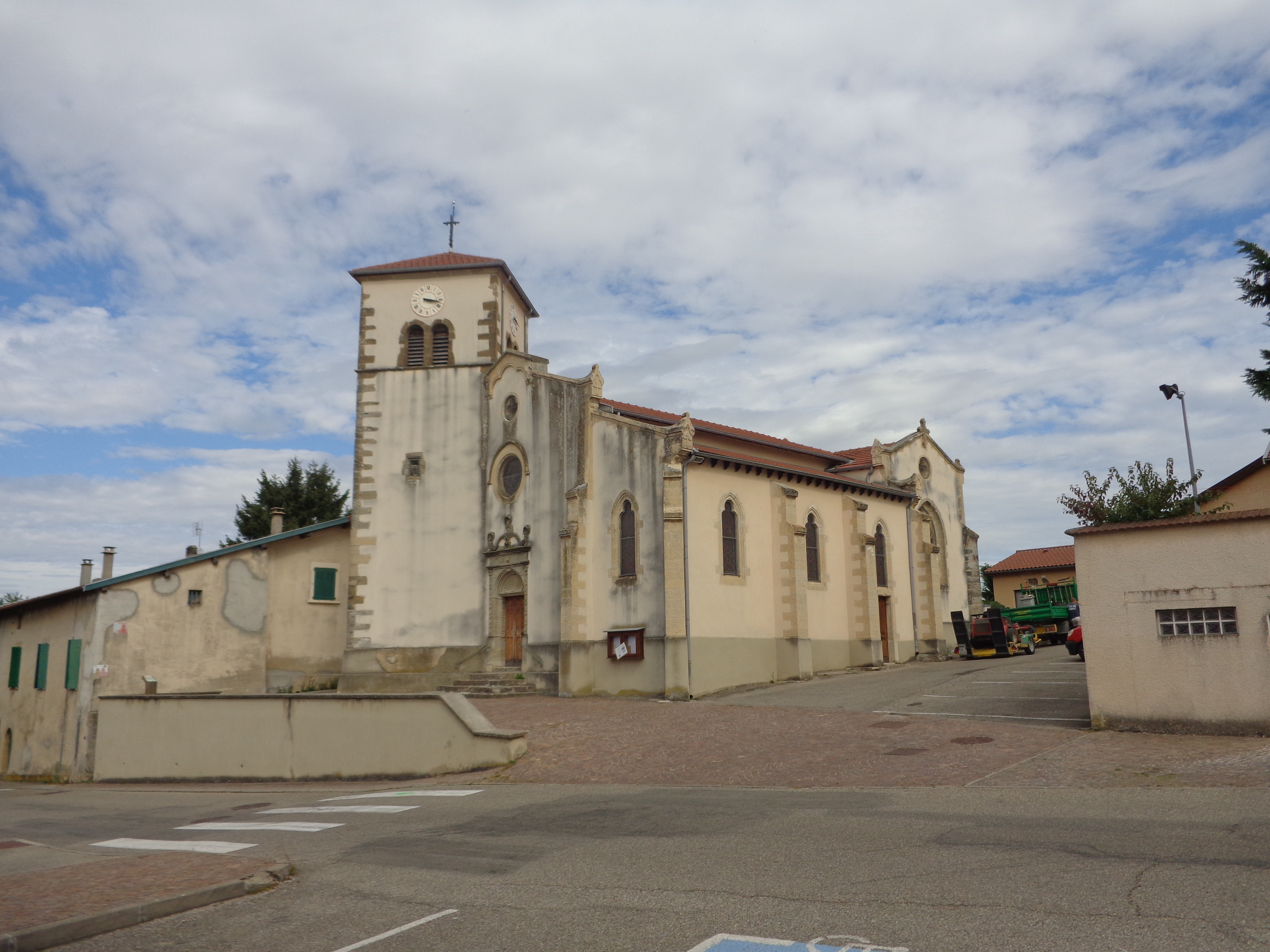 Église Saint-Roch de Diémoz .